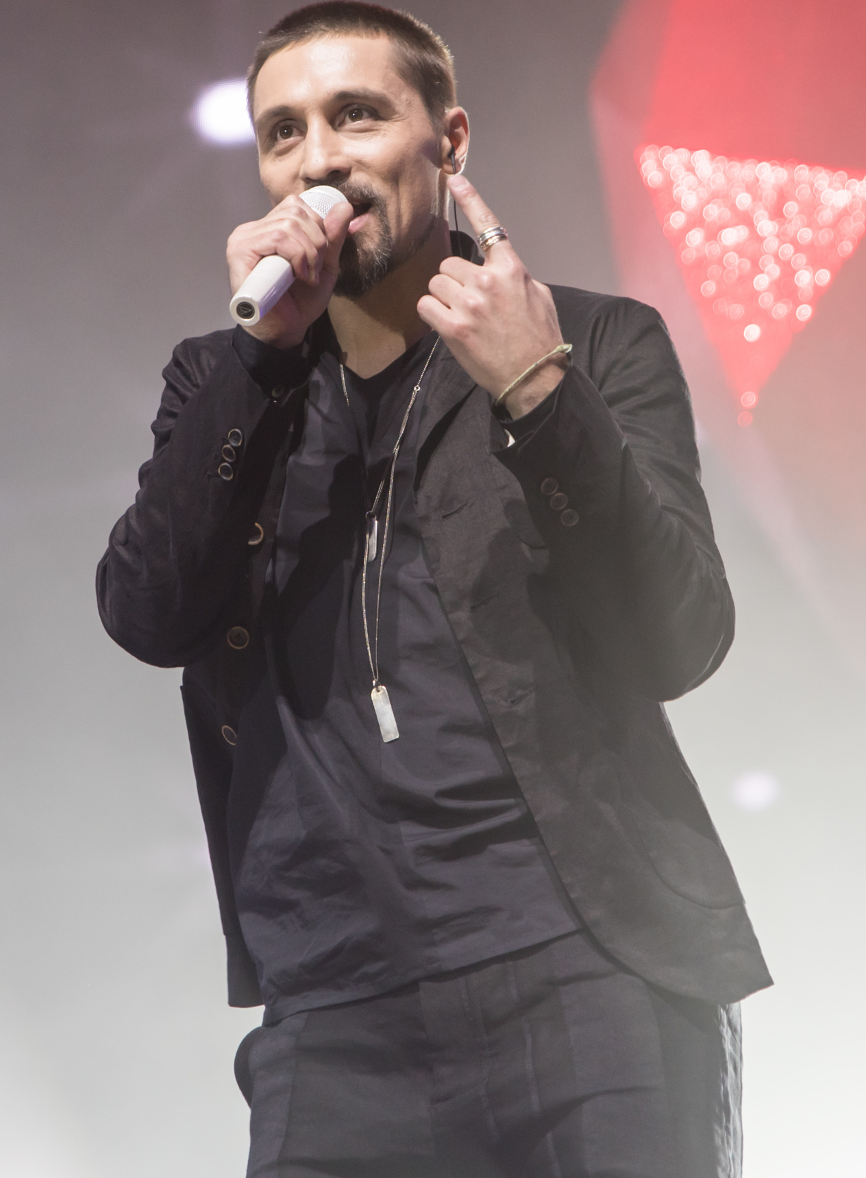 Дима Билан на Big Love Show 2018 в СПб